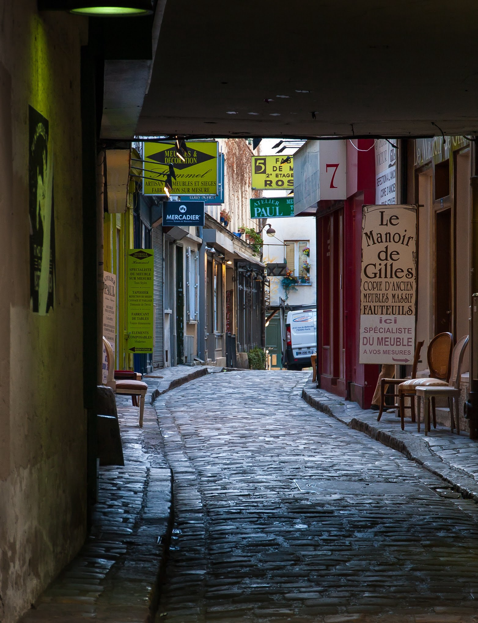 Passage du Chantier, Paris, France.